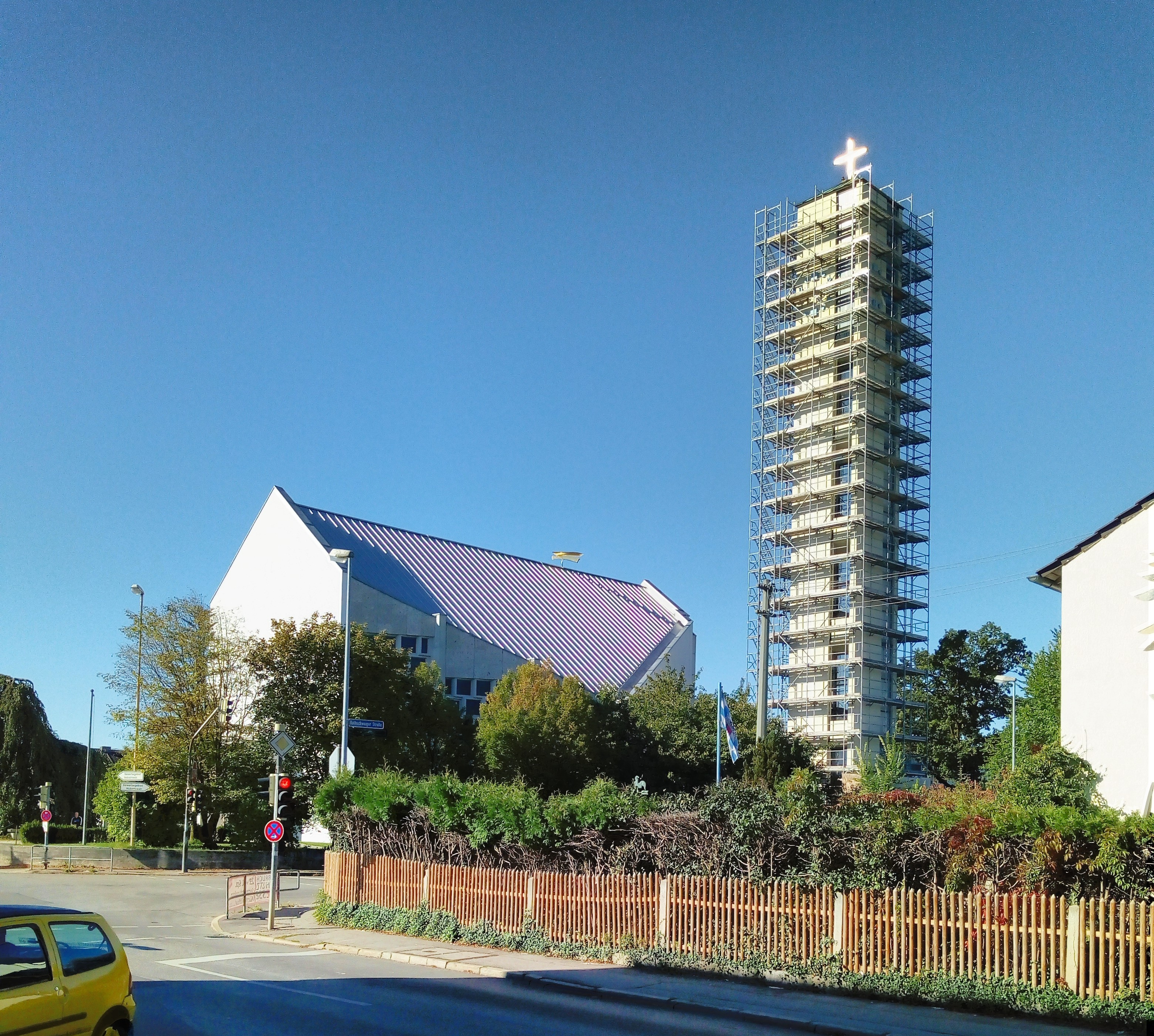 Komplettansicht der St. Bernhard-Kirche (Aufgenommen aus der Heimstättenstraße)